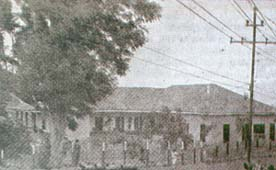 Maison paterneele de Jorge Isaacs dans le quartier El Peñón à Cali